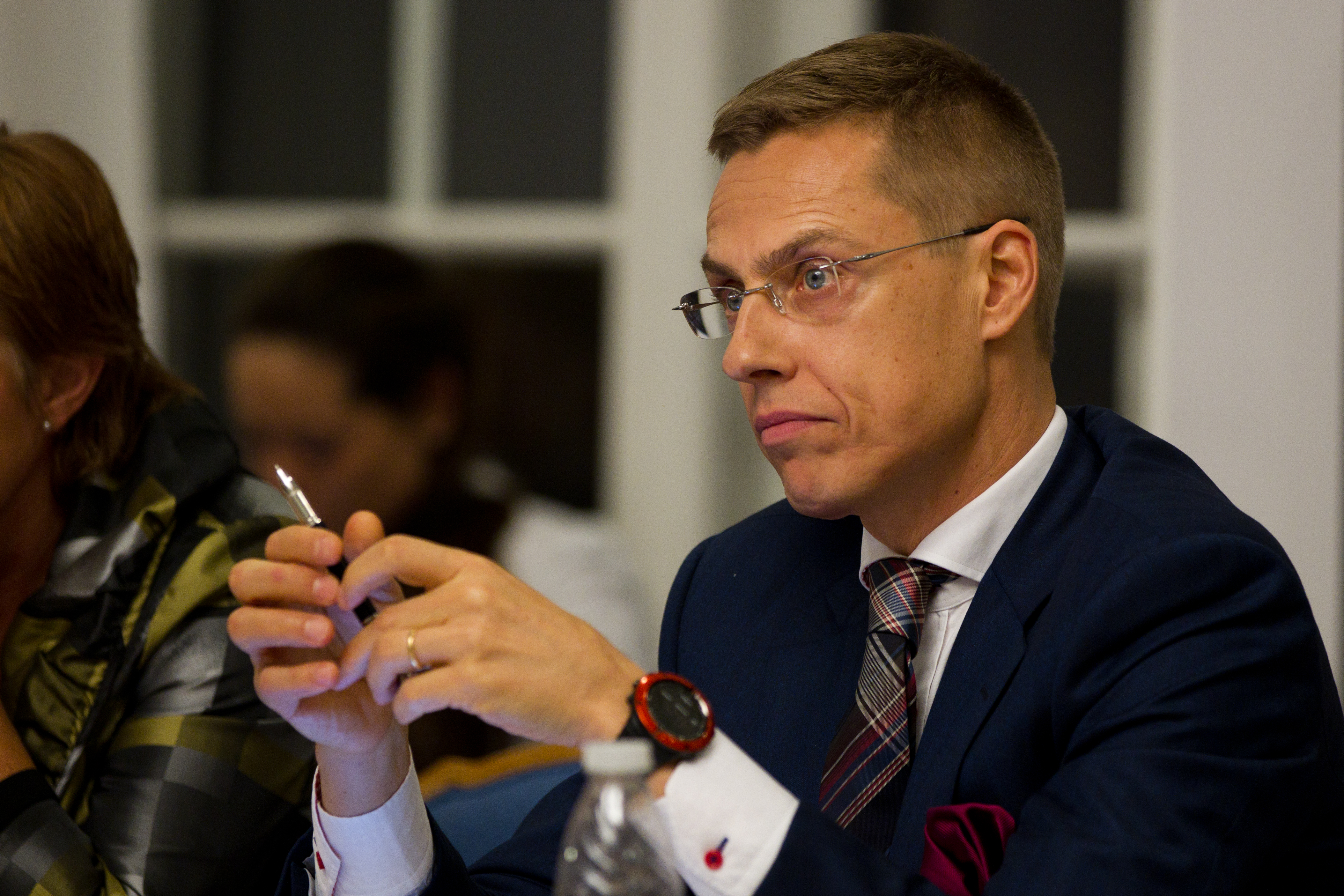 Finlands nordiske samarbetsminister Alexander Stubb under Nordiska Rådets session 2011 i Köpenhamn.